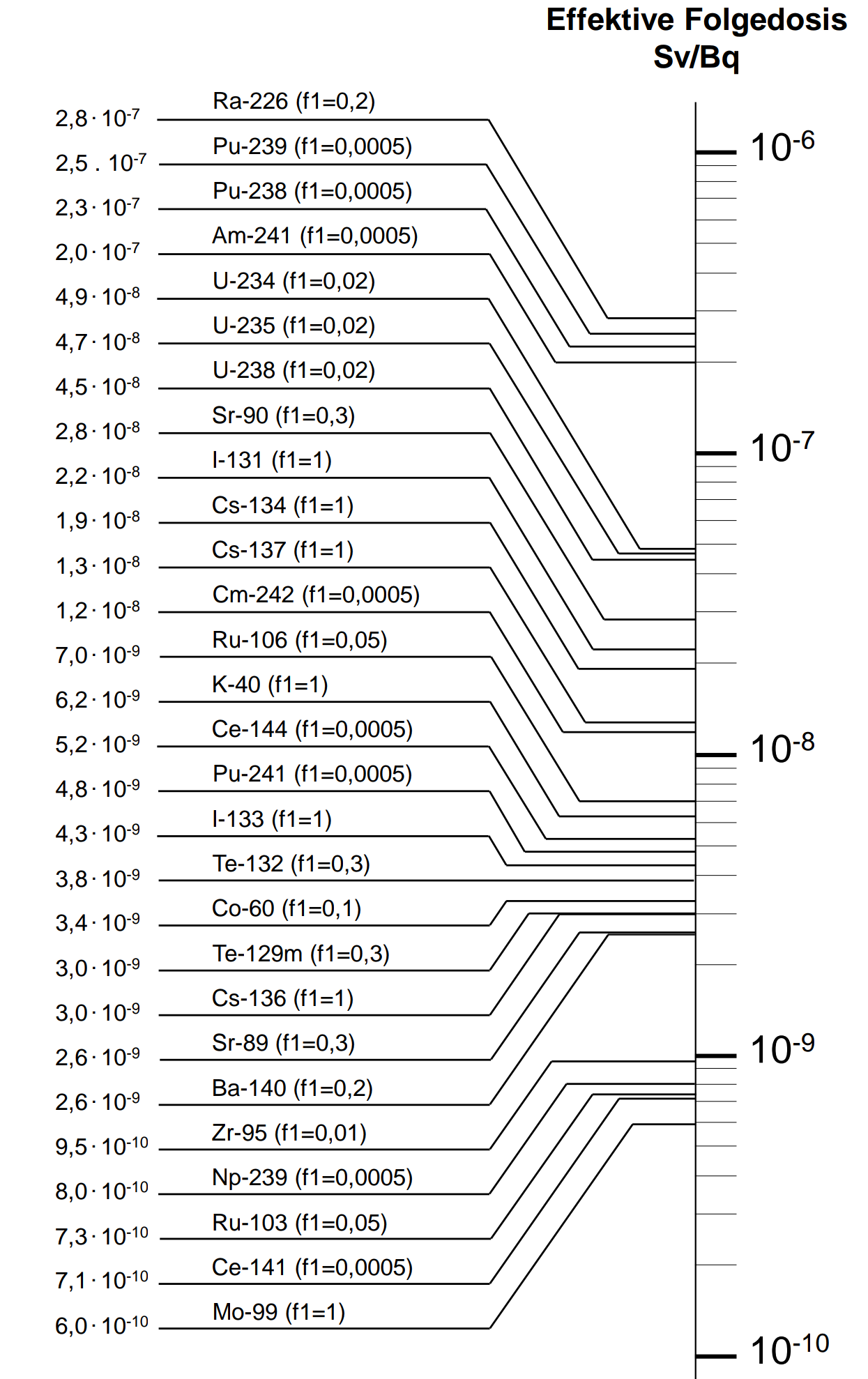 Dosiskoeffizienten (effektive Folgedosis) für die Ingestion ausgewählter Radionuklide